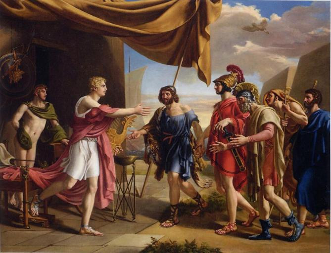 Gottlieb Schick, Achille reçoit les ambassadeurs d'Agamemnon, 1801, collection particulière